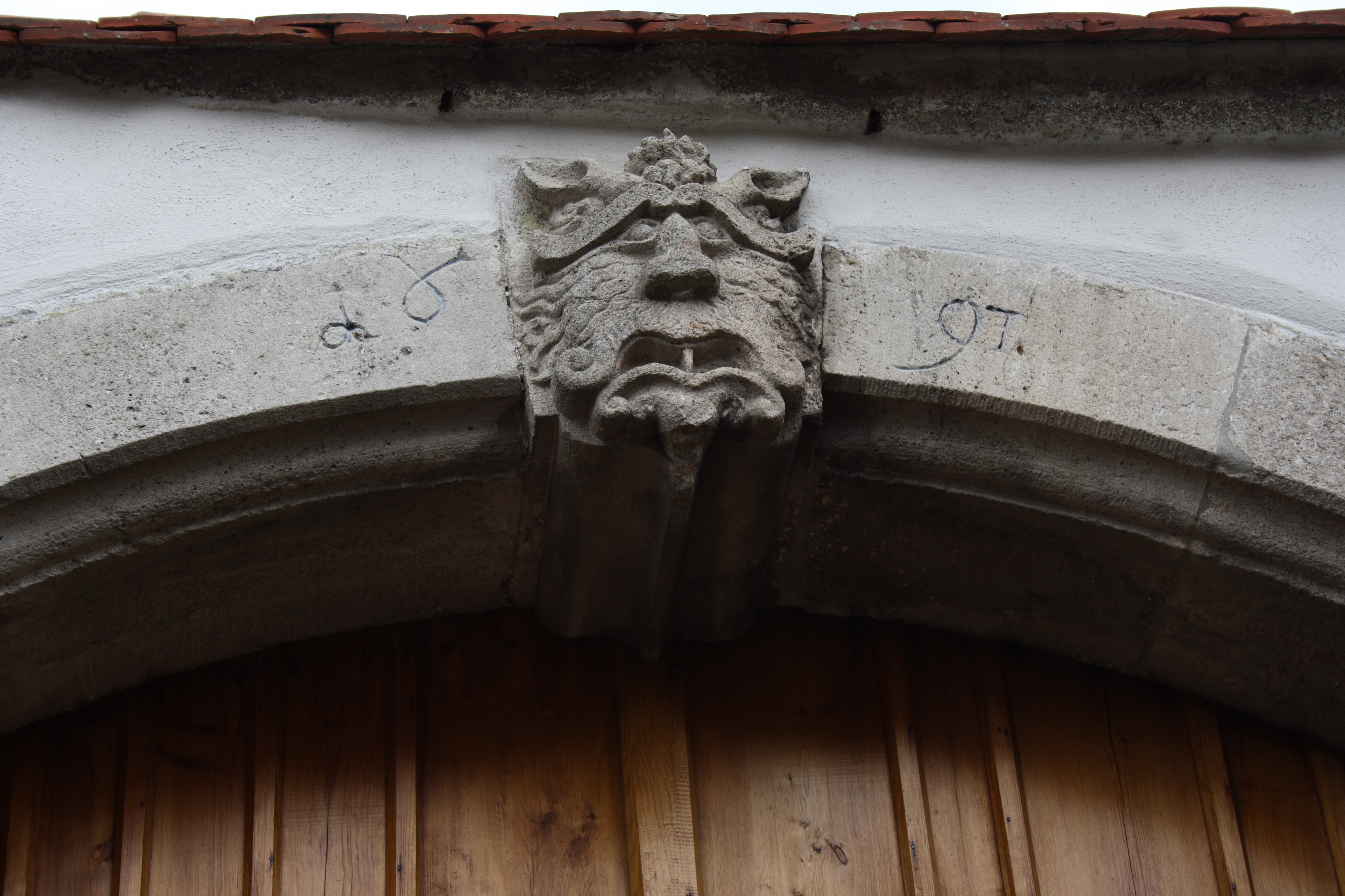 Museum in Grünsfeld im Main-Tauber-Kreis (Baden-Württemberg), Schloßstraße 7